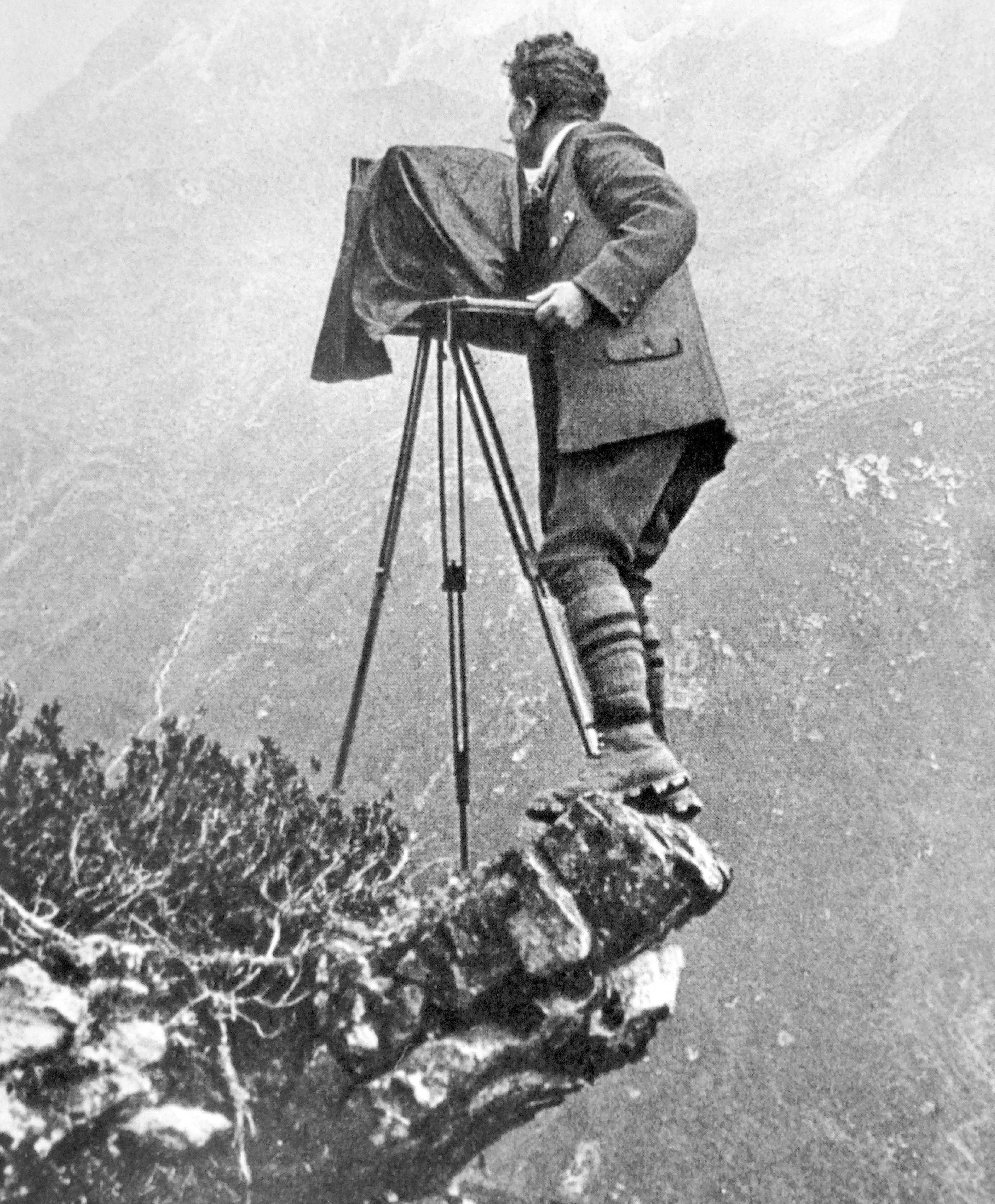 Emil Meerkämper Davoser Fotograf